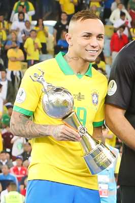 (Rio de Janeiro - RJ, 07/07/2019) Presidente da República, Jair Bolsonaro, e o Presidente da Confederação Sul-Americana de Futebol (CONMEBOL), Alejandro Domínguez, durante entrega da premiação da Copa América 2019. Foto: Clauber Cleber Caetano/PR